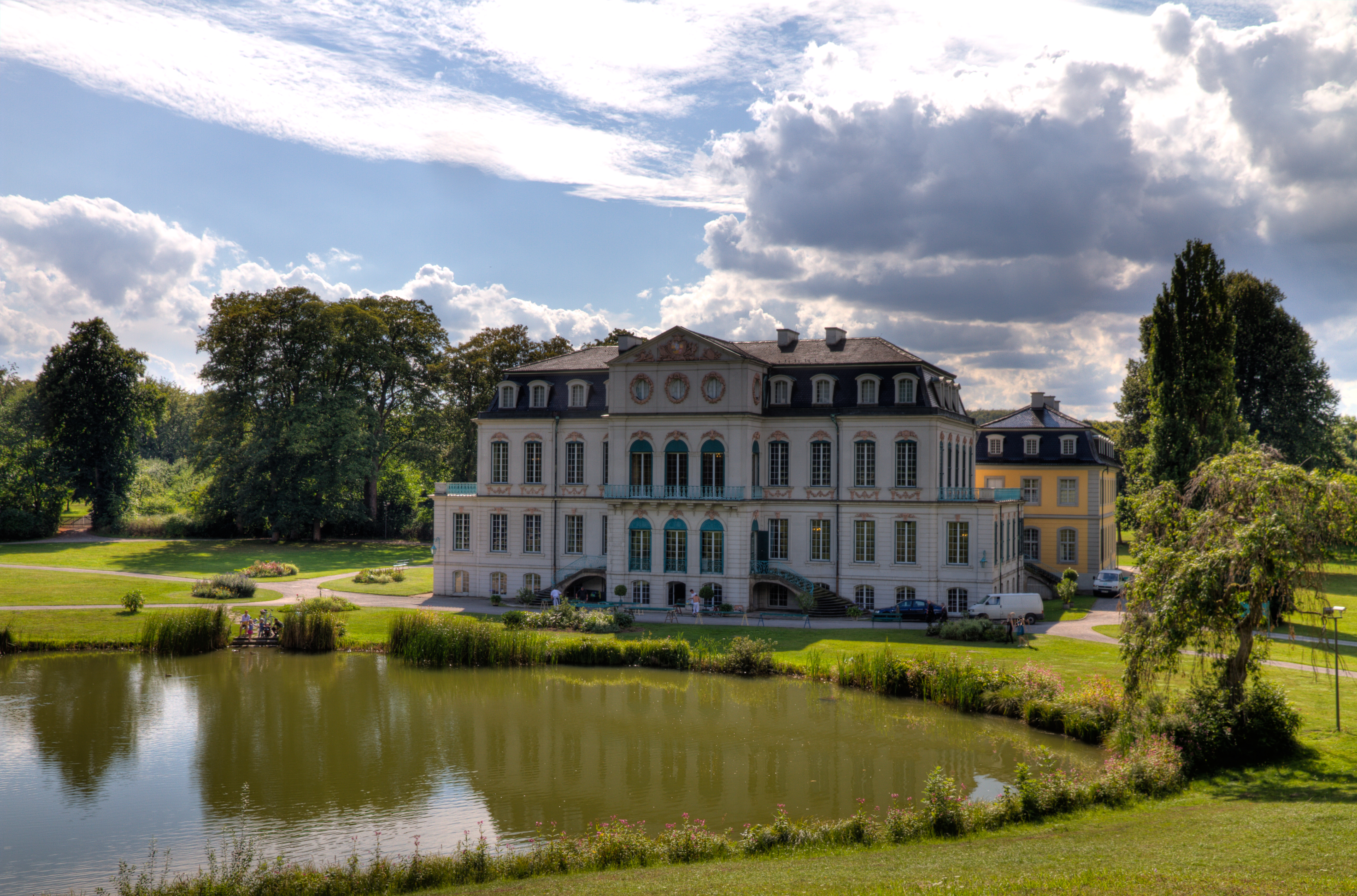 Schloss Wilhelmsthal bei Calden. DRI Aufnahme aus Belichtungsreihe mit 3 Bildern.